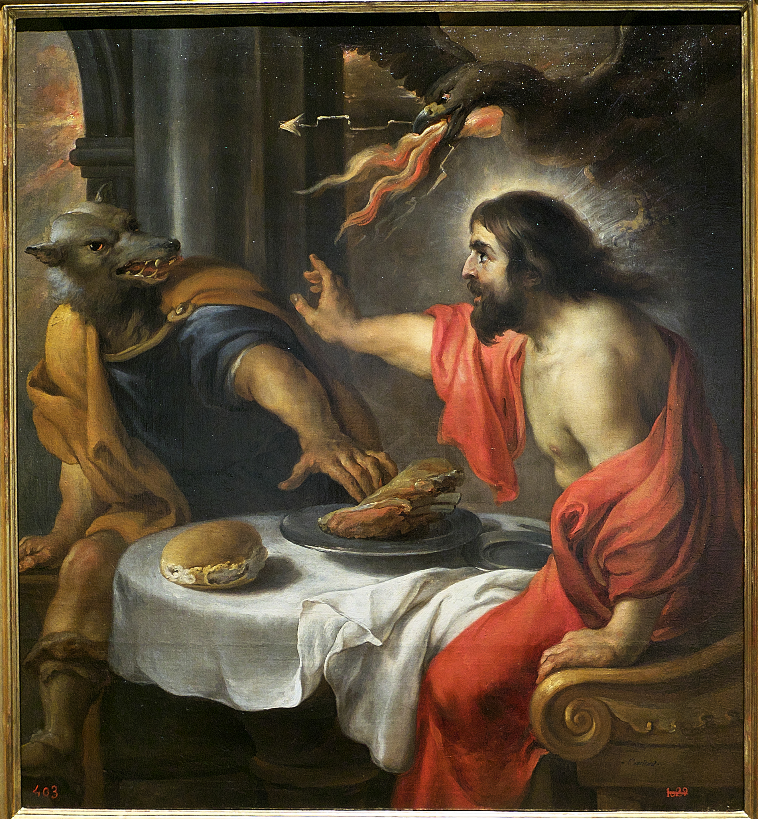 Licaón ofrece carne humana a Júpiter. Éste lo destruye con el rayo vengador y lo transforma en lobo. Relato de Ovidio en el libro I de Las Metamorfosis, que sirvió a Rubens para realizar un boceto sobre tabla con motivo del encargo para la Torre de la Parada. Jan Cossiers, ayudante de Rubens en el proyecto, lo emplea en este cuadro (1636-1638) pintado al óleo sobre lienzo.